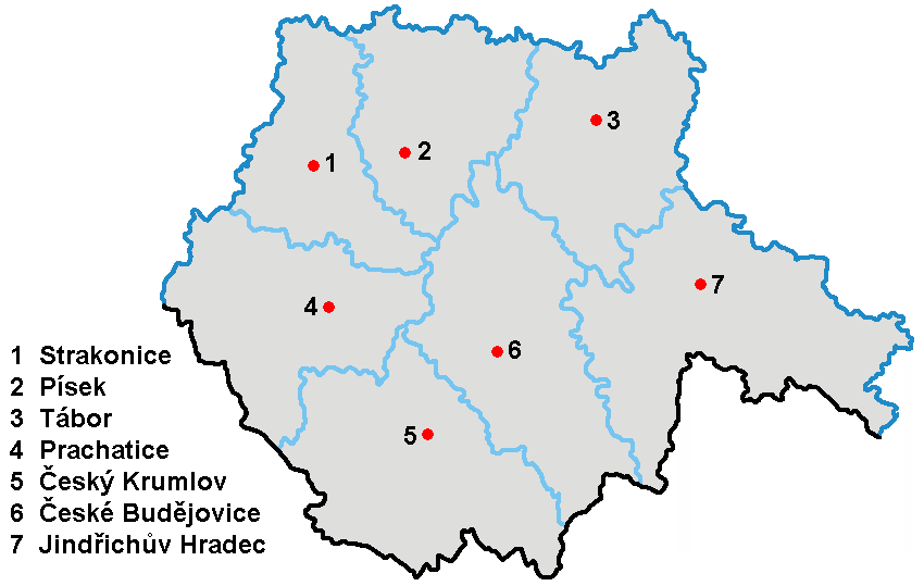 Die Bezirke der Südböhmischen Region in Tschechien